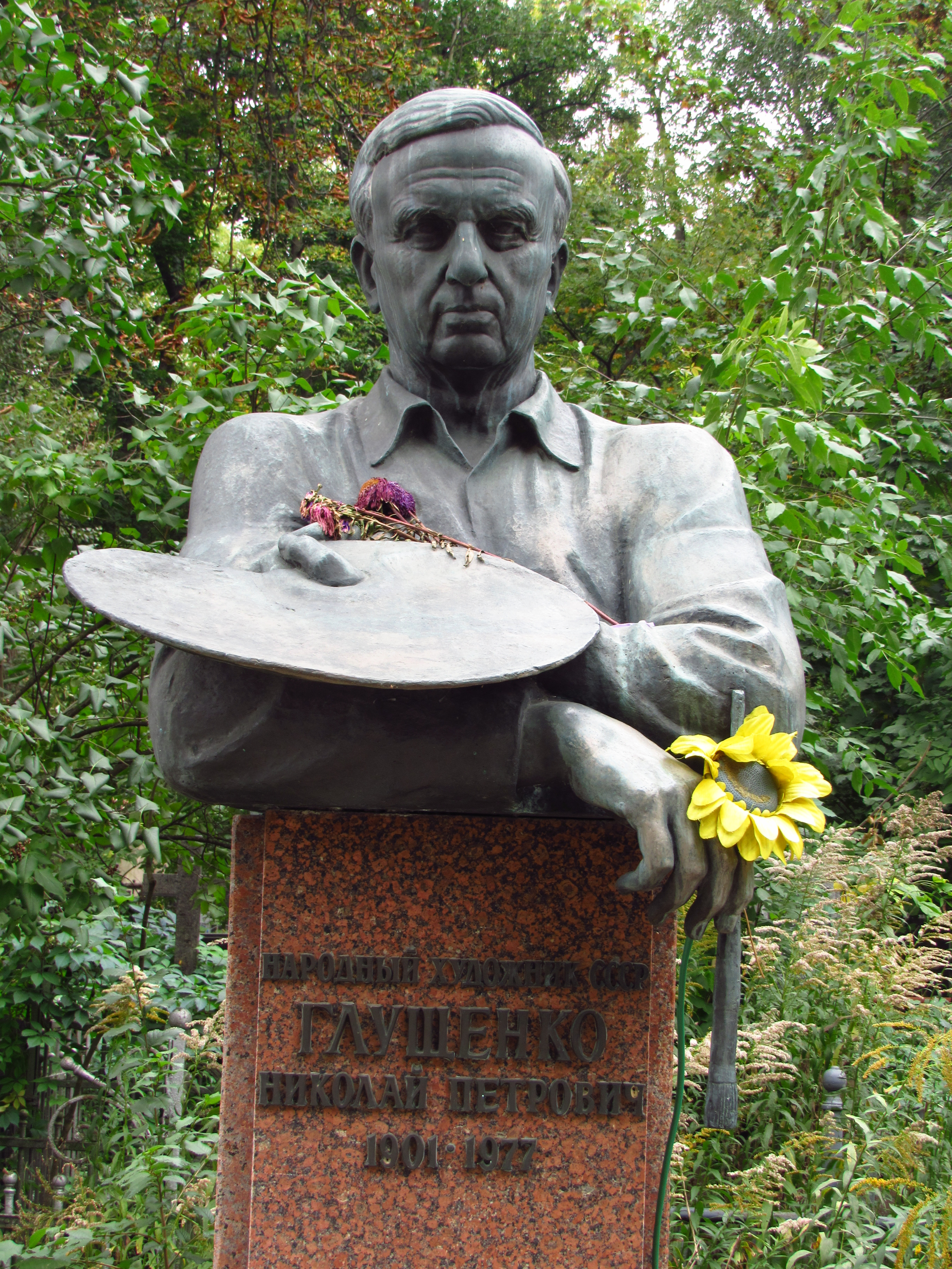 Могила живописця народного художника СРСР М. П. Глущенка, Київ, Байкова вул., 6, діл. 43